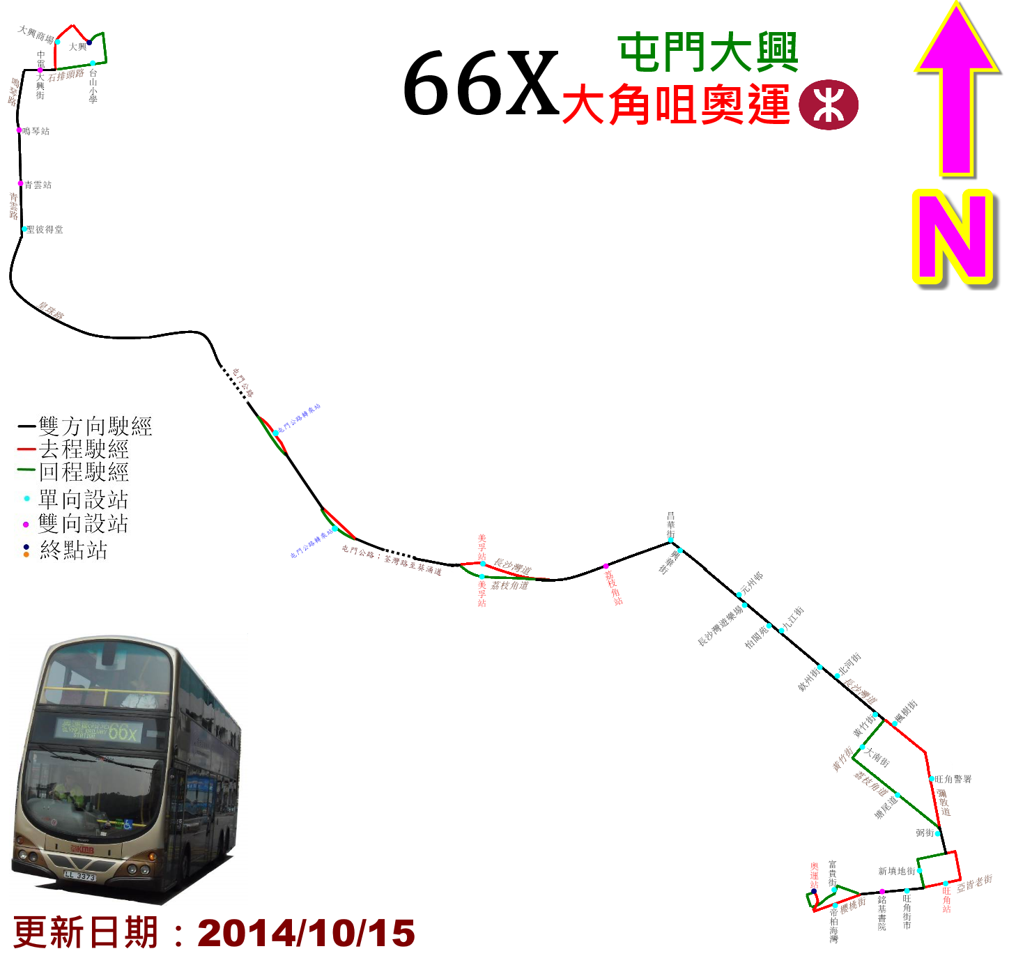 中文（香港）: 九巴66X線的走線圖